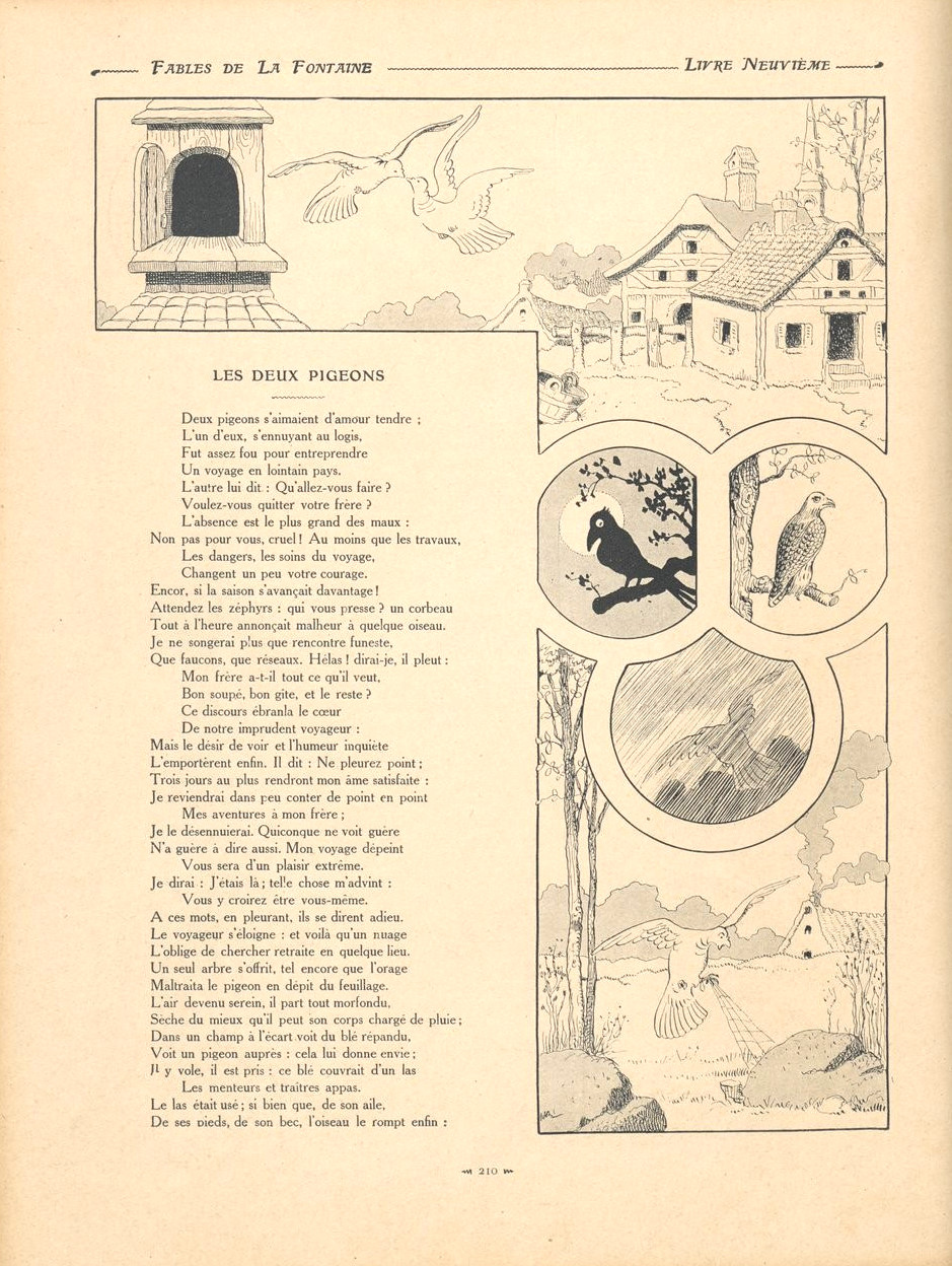 Fables de La Fontaine illustrées par Benjamin Rabier : Les deux pigeons.